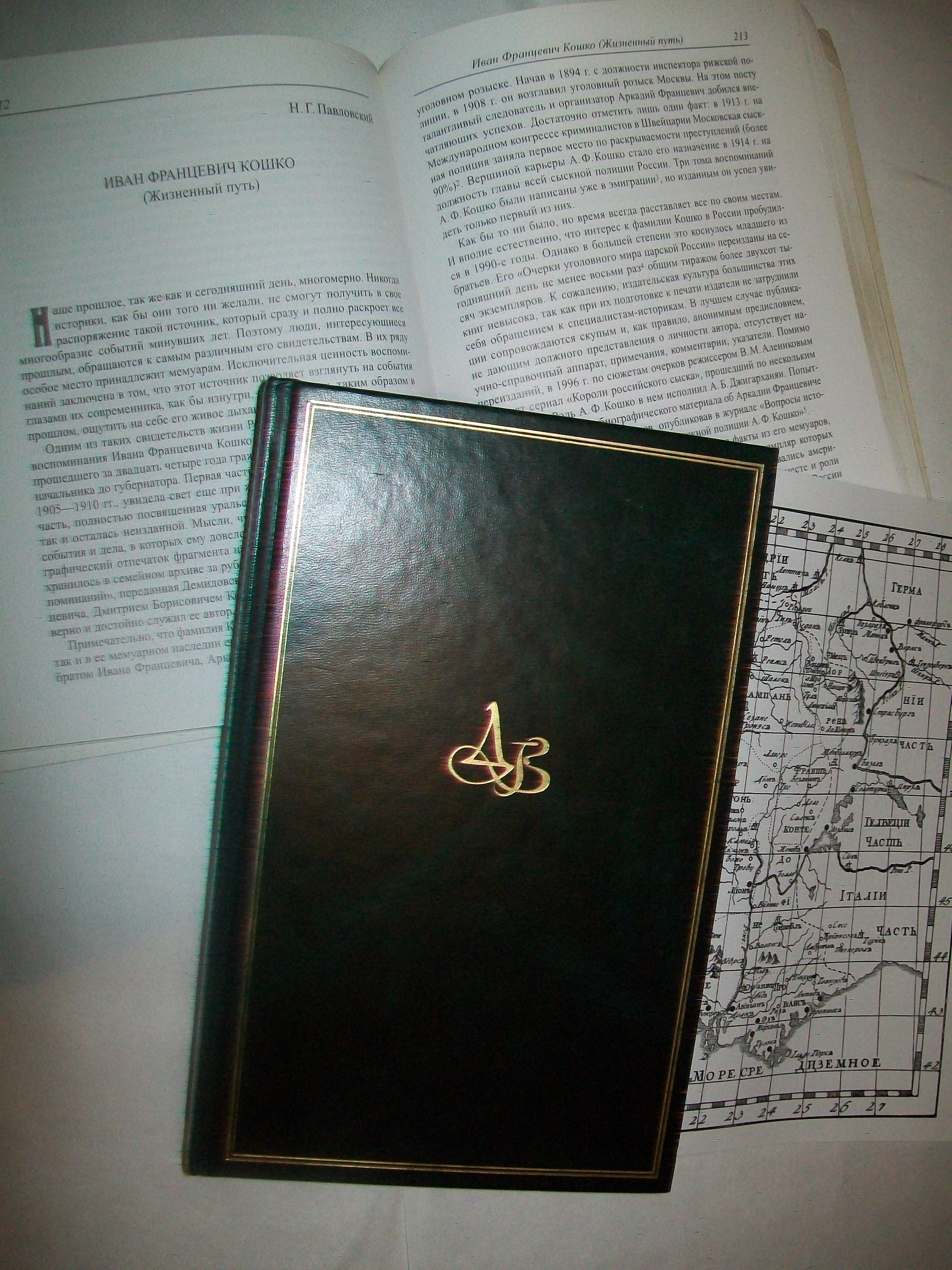 Книги Демидовского института